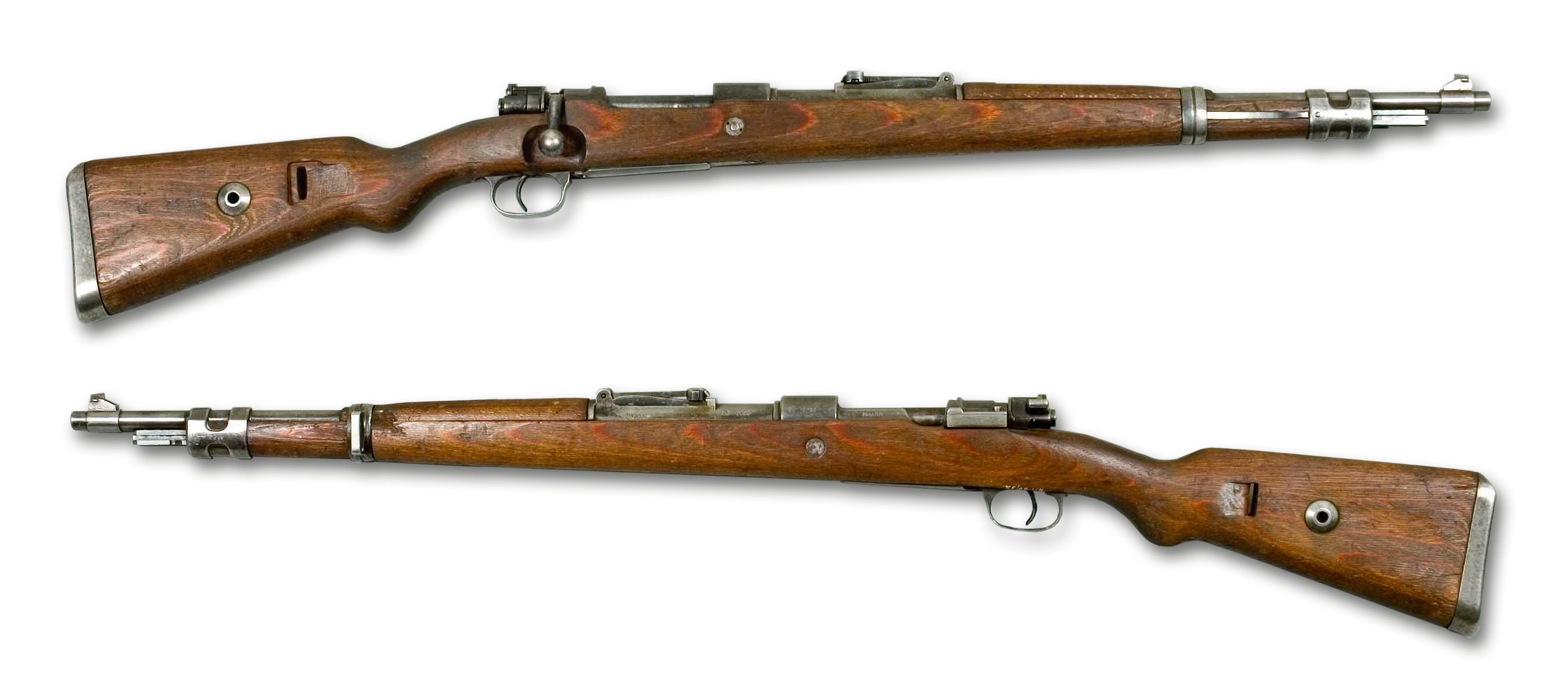 Darstellung eines Karabiner 98k